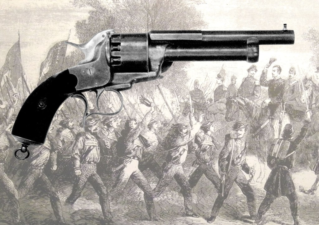 Perkussions Revolver Le Mat